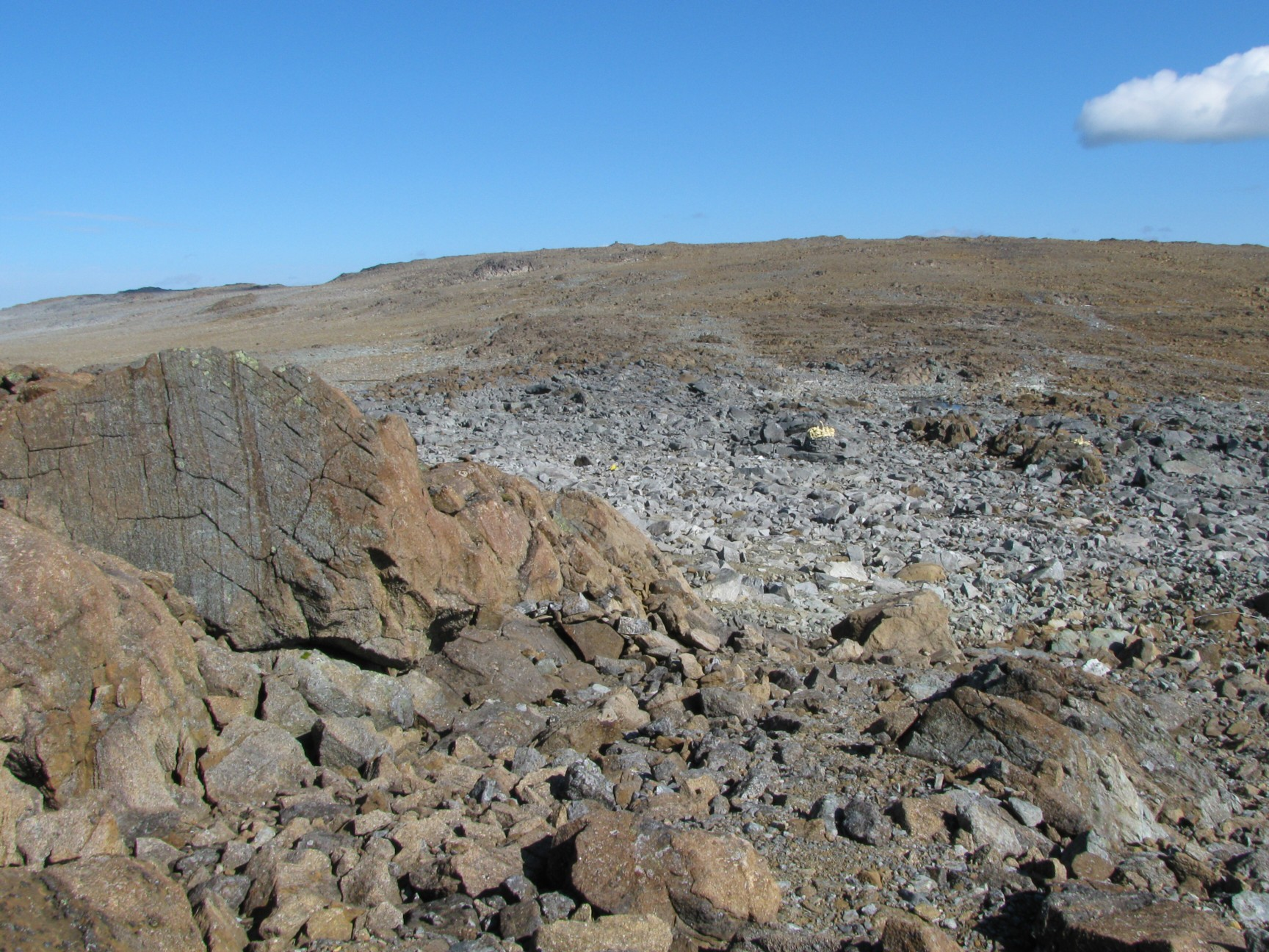 Rajapyykki 304 on matalassa notkelmassa Käsivarren äärimmäisessä kulmauksessa noin 680m koilliseen rajapyykiltä 303B.